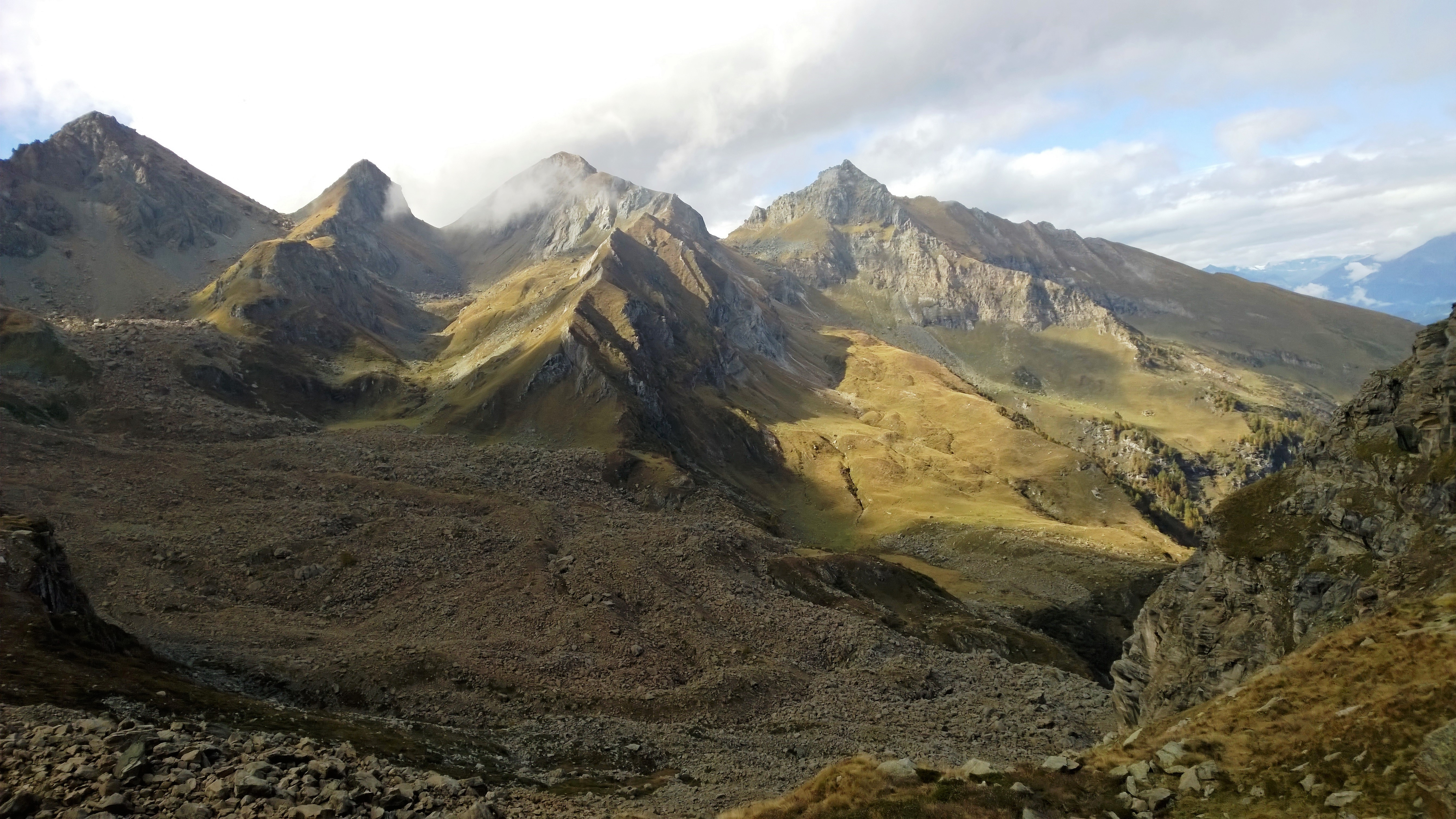 parco naturale Orsiera-Rocciavrè (Q2052054)